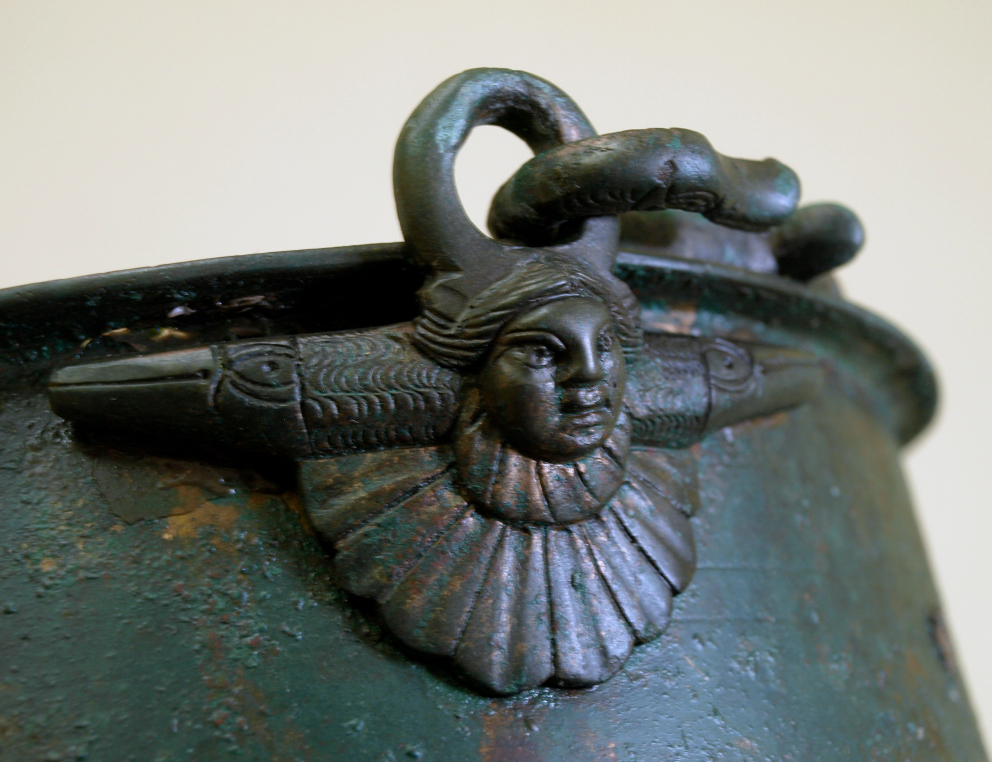 Bronzeeimer von Sasendorf, Henkelattache